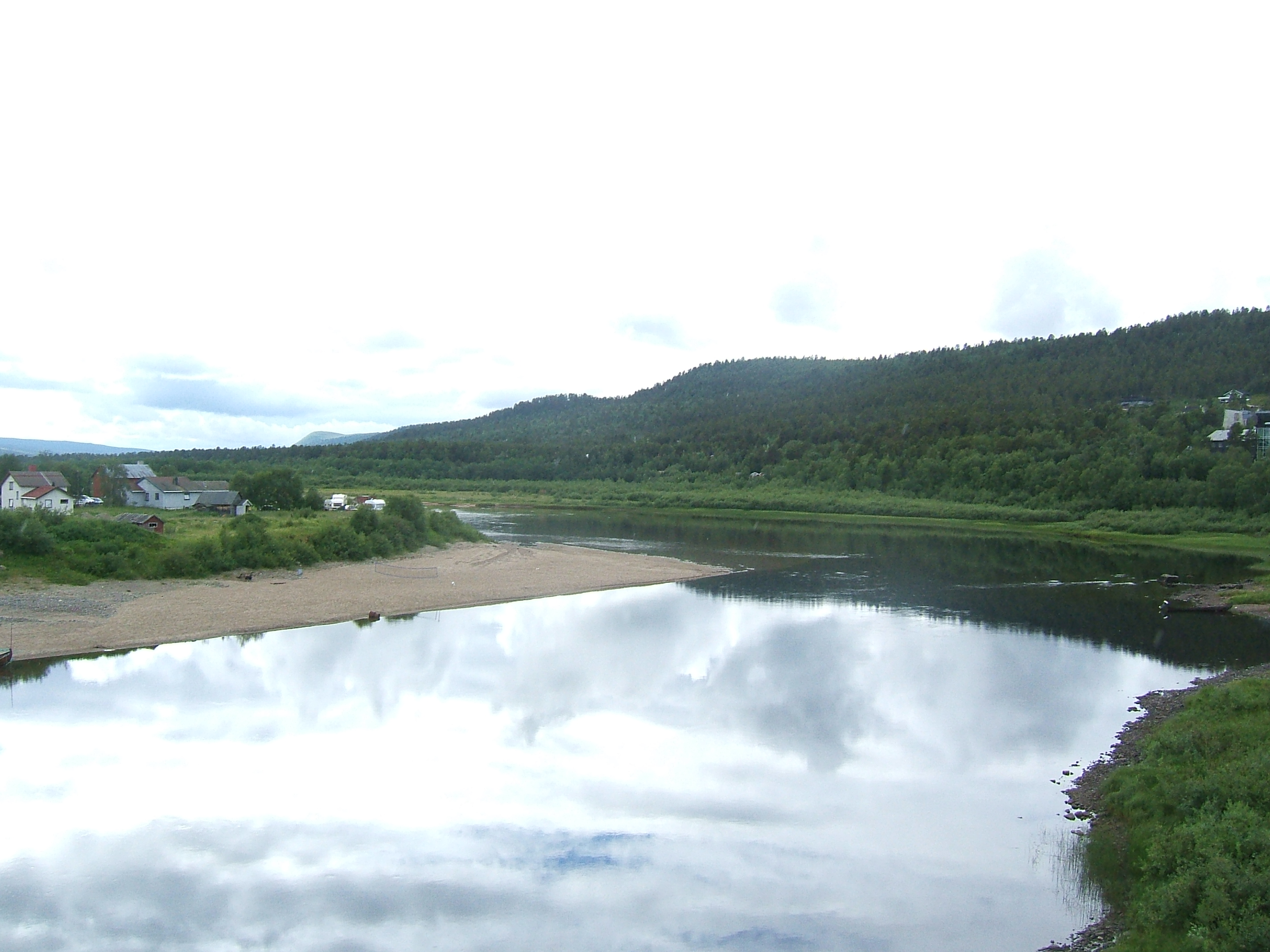 Kárášjokha river